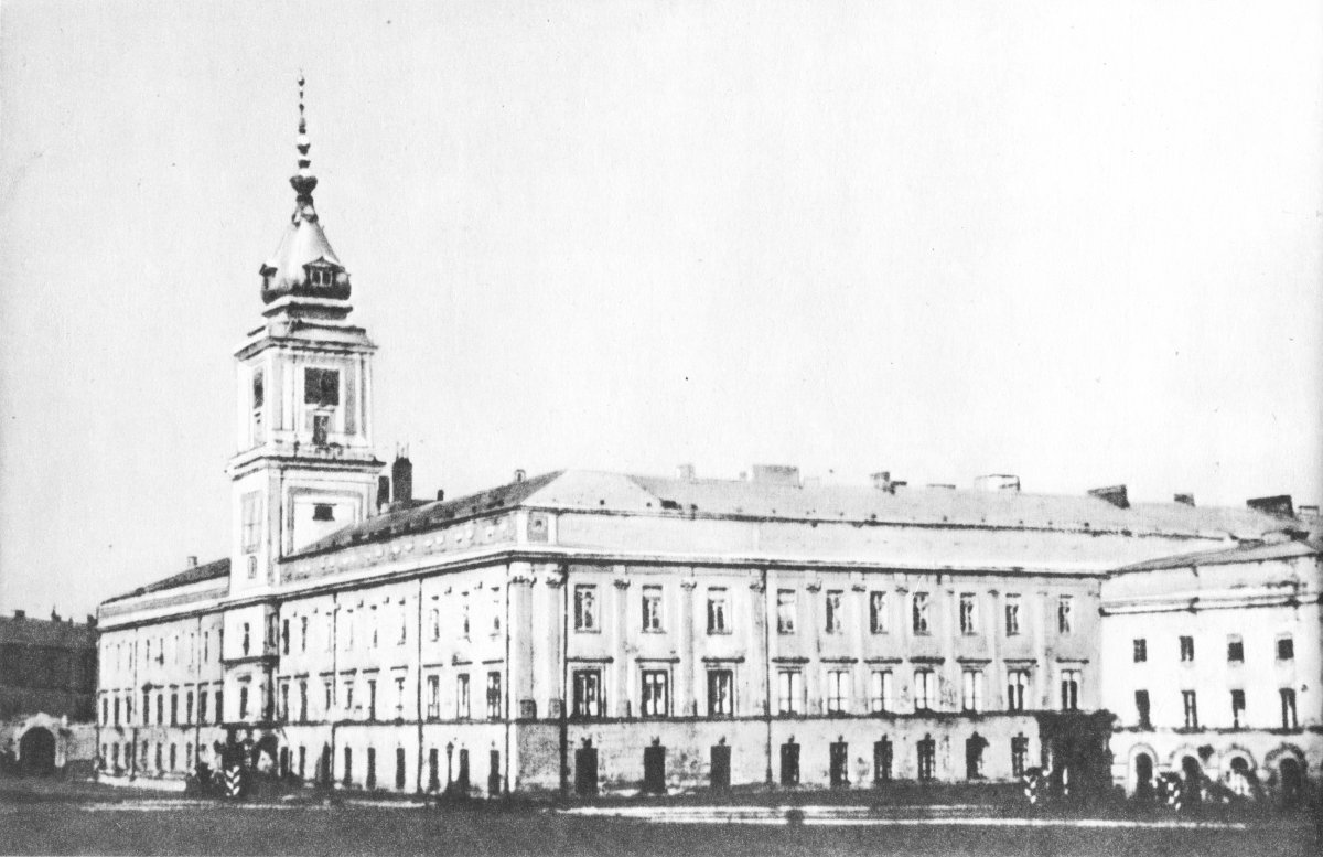 Zamek Królewski w Warszawie